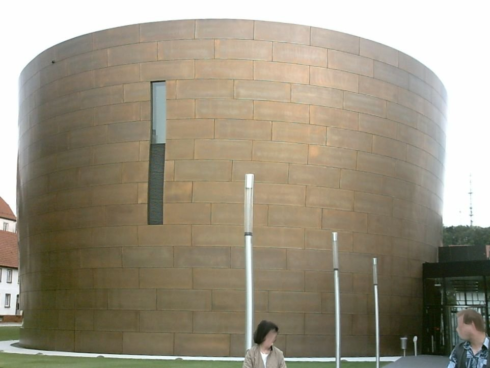 Die neue Welt von Steiff, Museum in Giengen an der Brenz, selbst fotografiert von Xocolatl im Sommer 2005